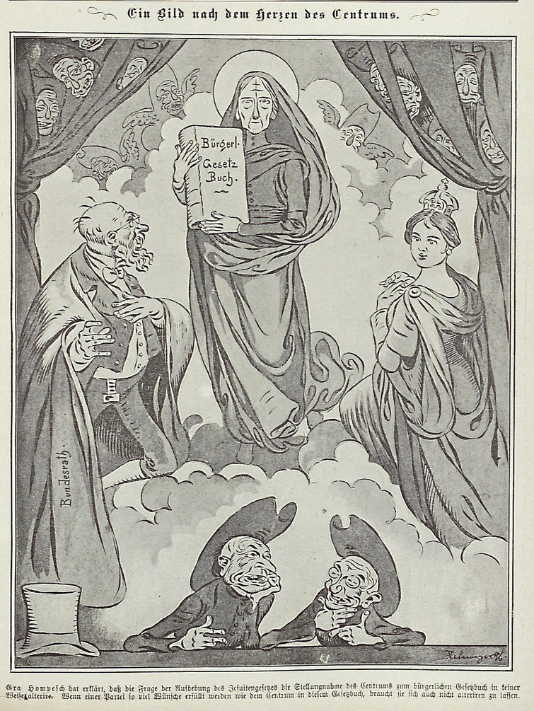 Ein Bild nach dem Herzen des Zentrums: Graf Hompesch hat erklärt, dass die Frage der Aufhebung des Jesuitengesetzes die Stellungnahme des Zentrums zum Bürgerlichen Gesetzbuch in keiner Weise alteriere. Wenn einer Partei so viele Wünsche erfüllt werden wie dem Zentrum in diesem Gesetzbuch, braucht sie sich auch nicht alterieren zu lassen